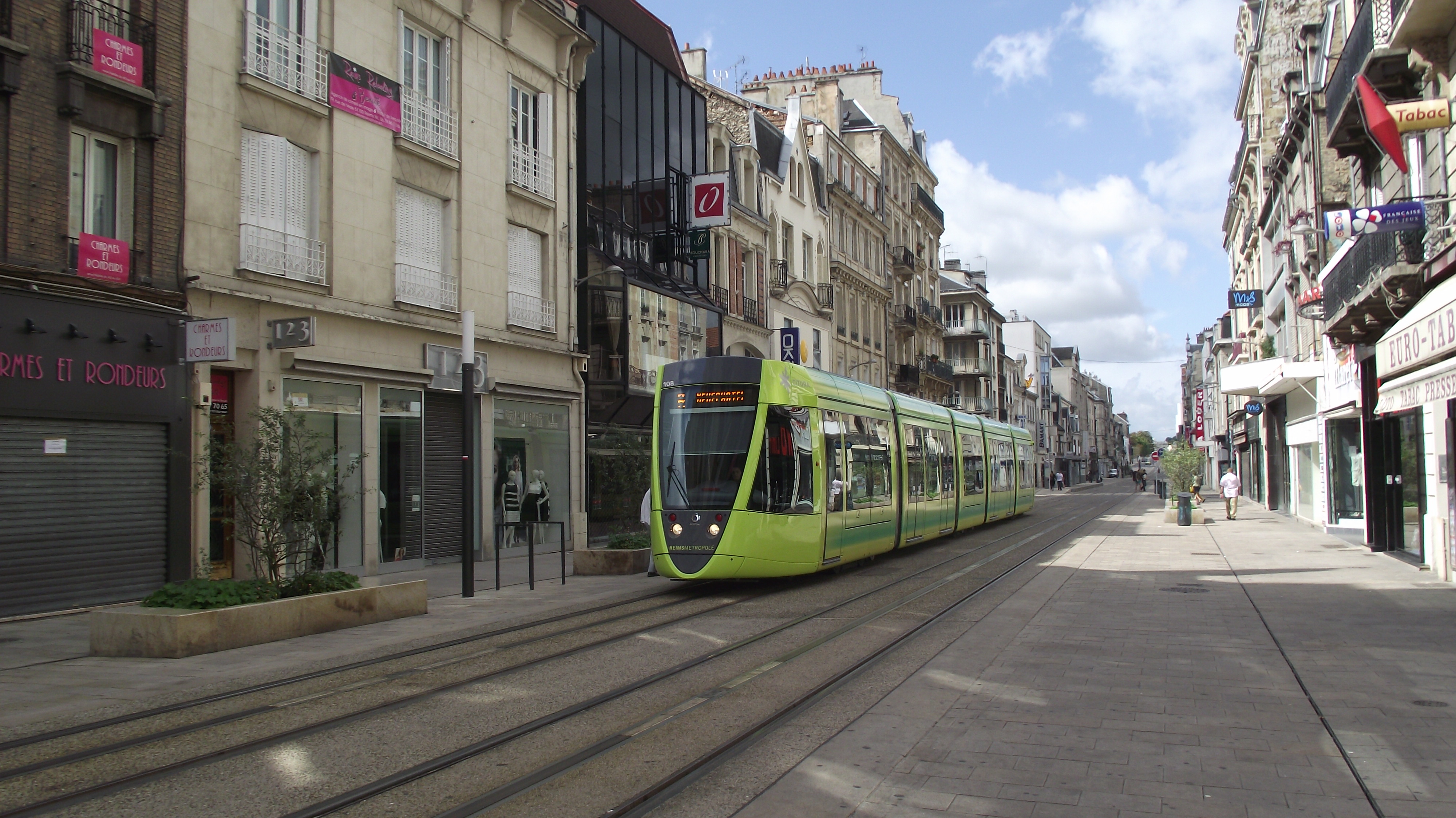 Geelgroene tram in Reims